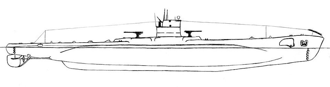 Итальянская субмарина времен Второй мировой войны, тип Ammiraglio Cagni,после уменьшения рубки, схема.